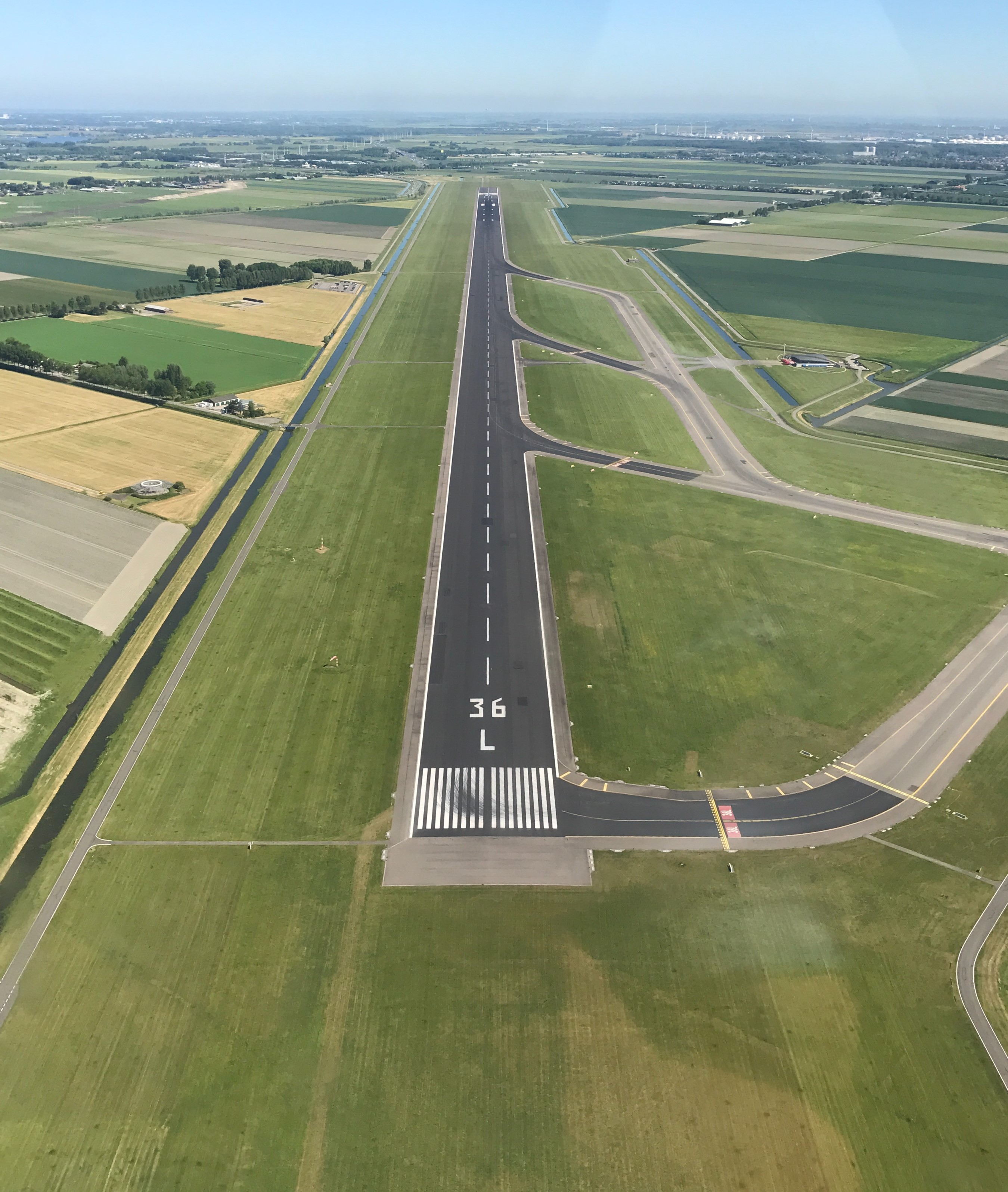 Polderbaan gezien vanuit de lucht in noordelijke richting.